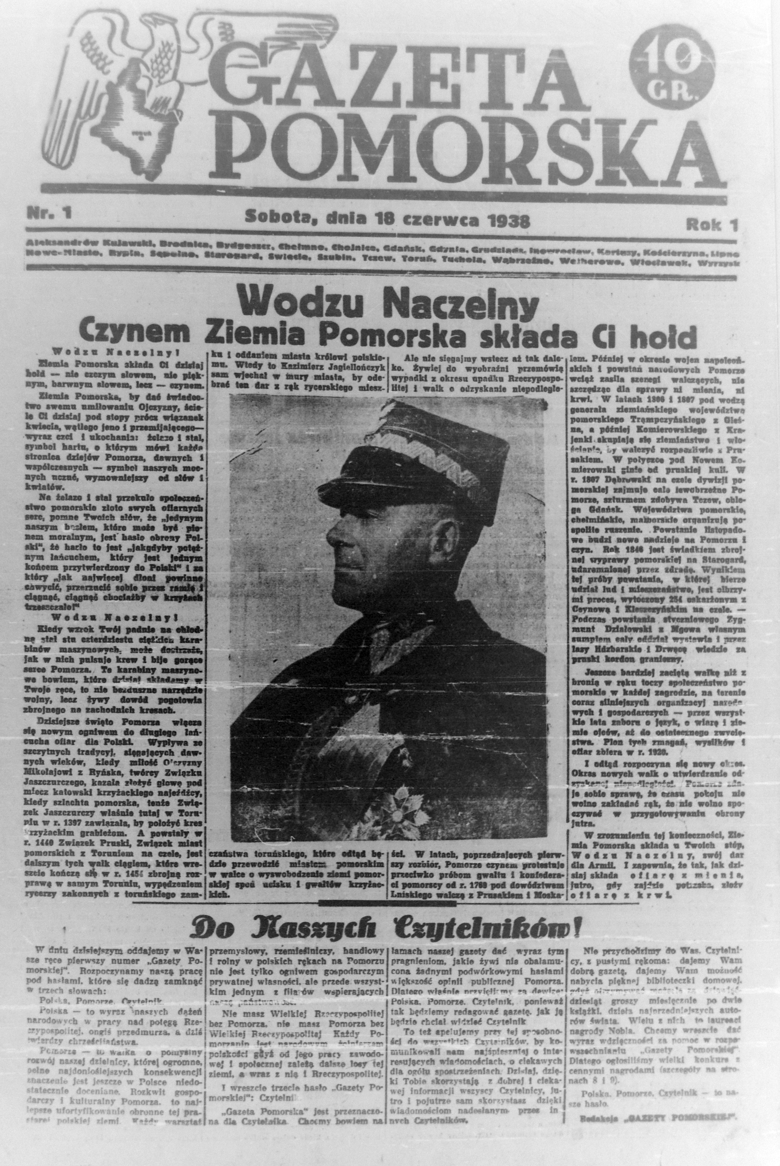 Pierwszy numer Gazety Pomorskiej 18.06.1938